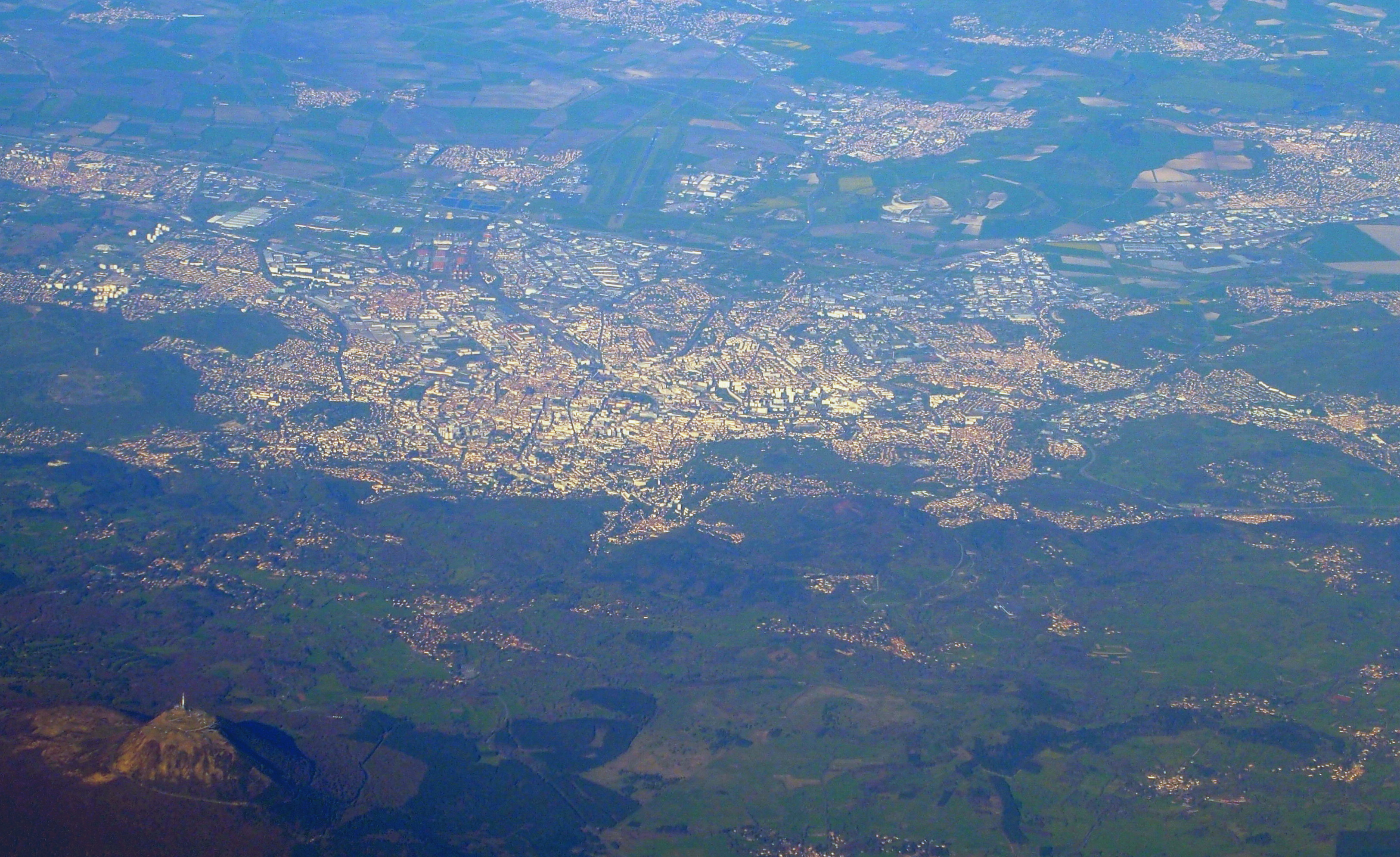 Vue aérienne de Clermont Ferrand avec au premier plan en bas à gauche le Puy-de-Dôme.